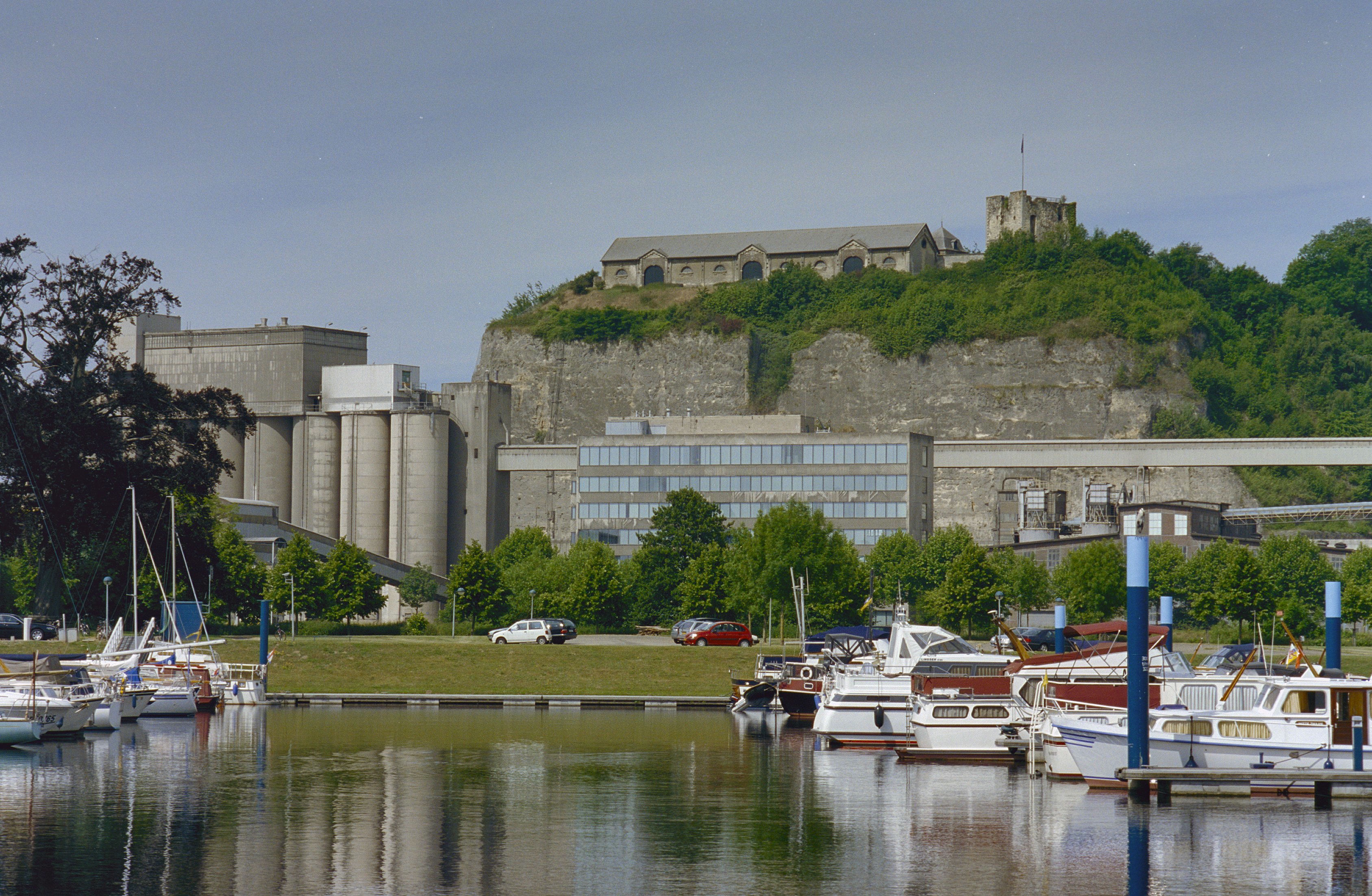 Kasteel Lichtenberg: Zicht op de ruïne van kasteel Lichtenberg met op de voorgrond het gebouwencomplex en de groeve van de ENCI langs de Maas, jachthaven op de voorgrond (opmerking: Gefotografeerd voor Kastelen in Limburg (1000-1800), Burchten en landhuizen)